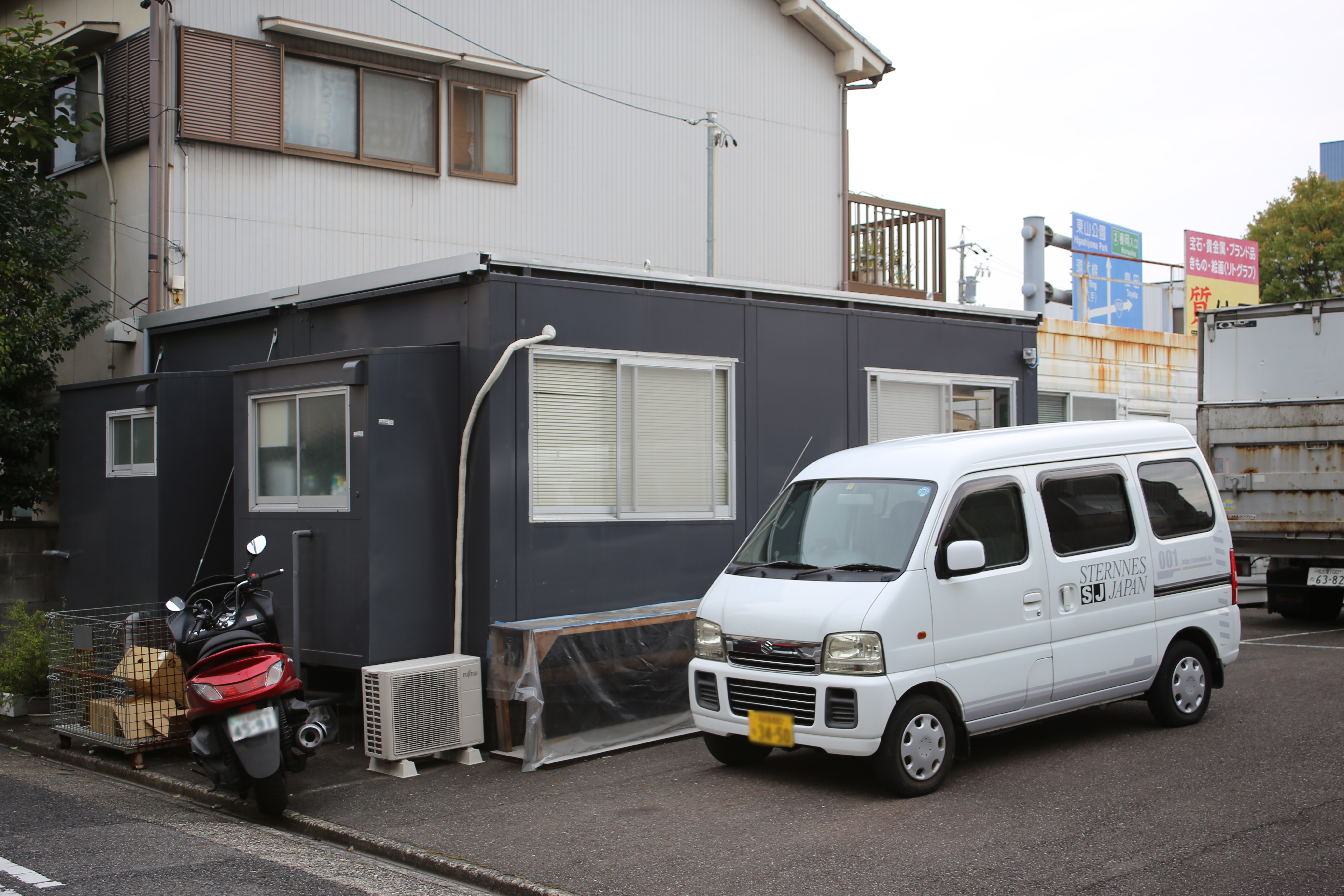 名古屋市千種区小松町のスターネスジャパン本社事務所を北側公道西側より撮影。ただし、ナンバープレートにつき画像処理済。